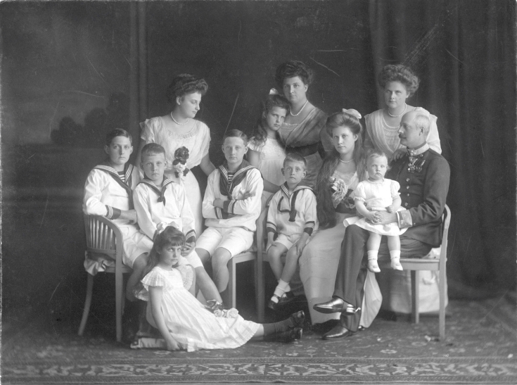 Erzherzog Leopold Salvator von Österreich-Toskana in Uniform als Feldzeugmeister, zusammen mit seiner Gattin Blanka von Castilien und seinen zehn Kindern.